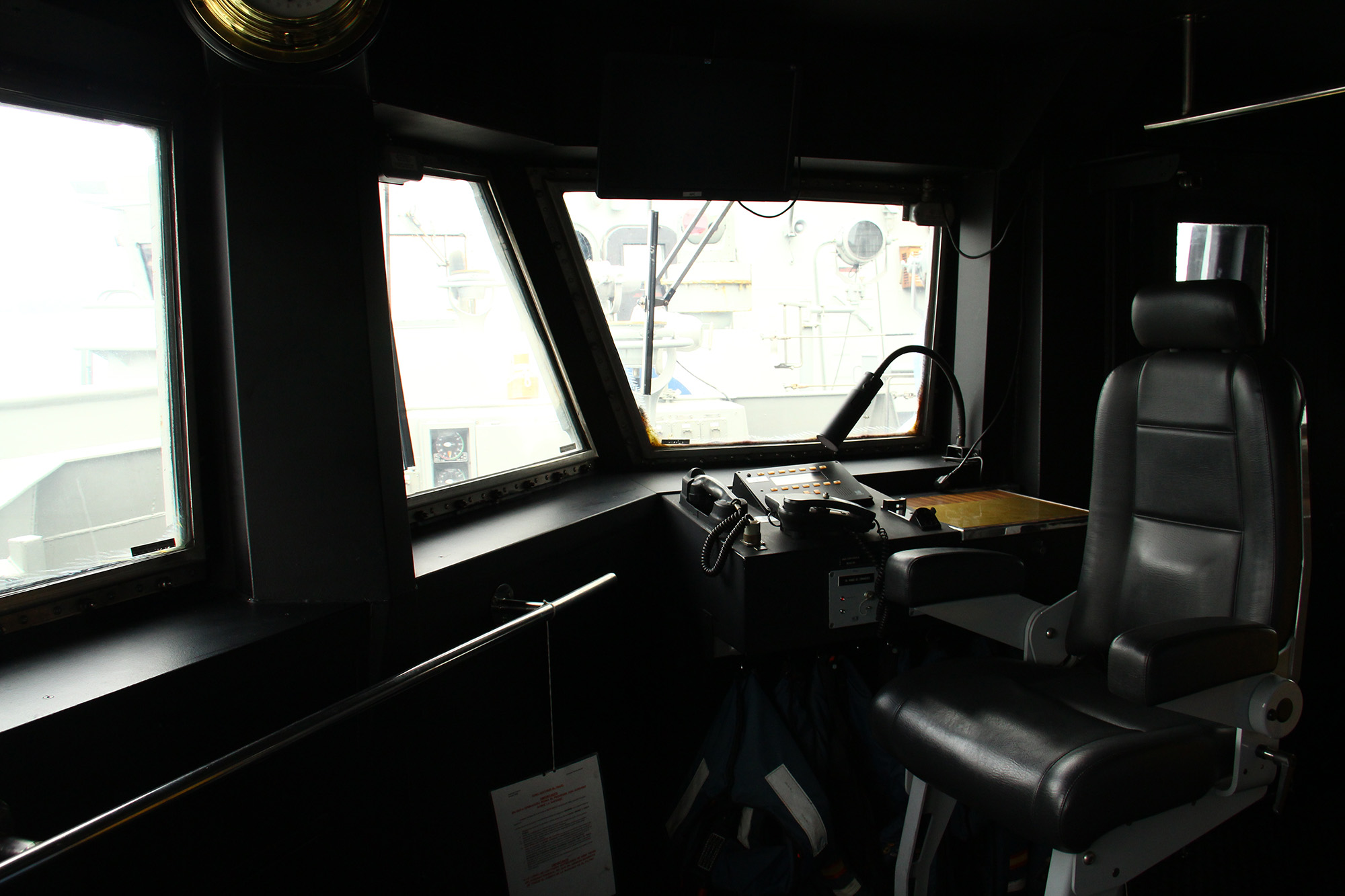 Visita a Vigo de las fragatas "Álvaro de Bazán" F-101 y "Almirante Juan de Borbón" F-102 de la Armada Española, ambas de la clase "Álvaro de Bazán" (también conocida como F-100), el 27 y 28 de mayo de 2017. Frigates F-100 in Vigo Visit to Vigo of the frigates "Álvaro de Bazán" F-101 and "Admirante Juan de Borbón" F-102 of the Spanish Navy, both of the class "Álvaro de Bazán" (also known as F-100), May 27 and 28, 2017.